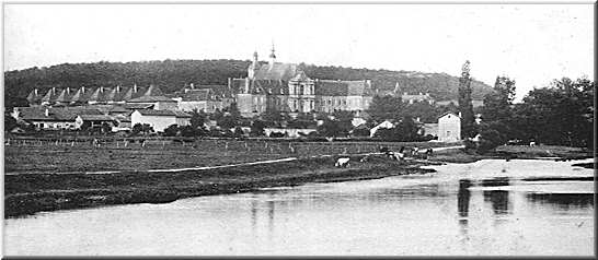 Chartreuse de Bosserville à Art-sur-Meuse, vers 1910 (vue du Pont de la Meurthe)